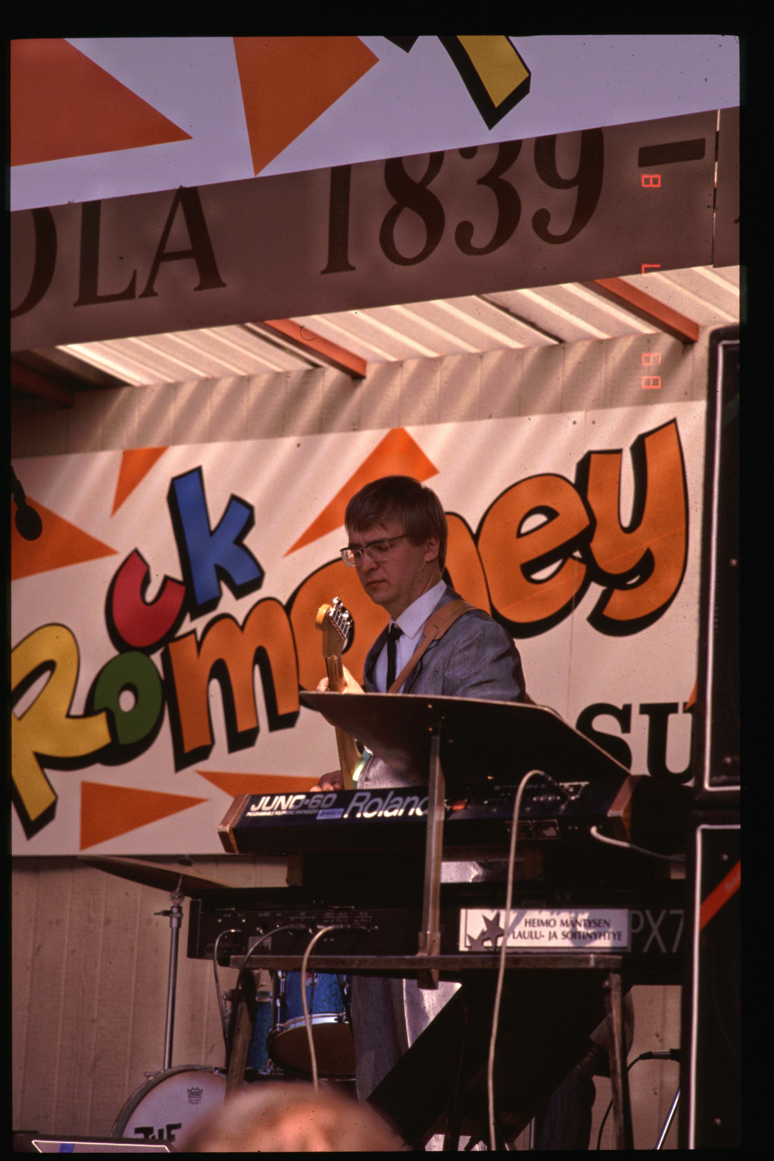 Kuva The Quiets yhtyeen esityksestä Heinolassa 8. heinäkuuta vuodelta 1989